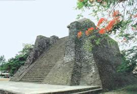 Fachada Castillo de Teayo